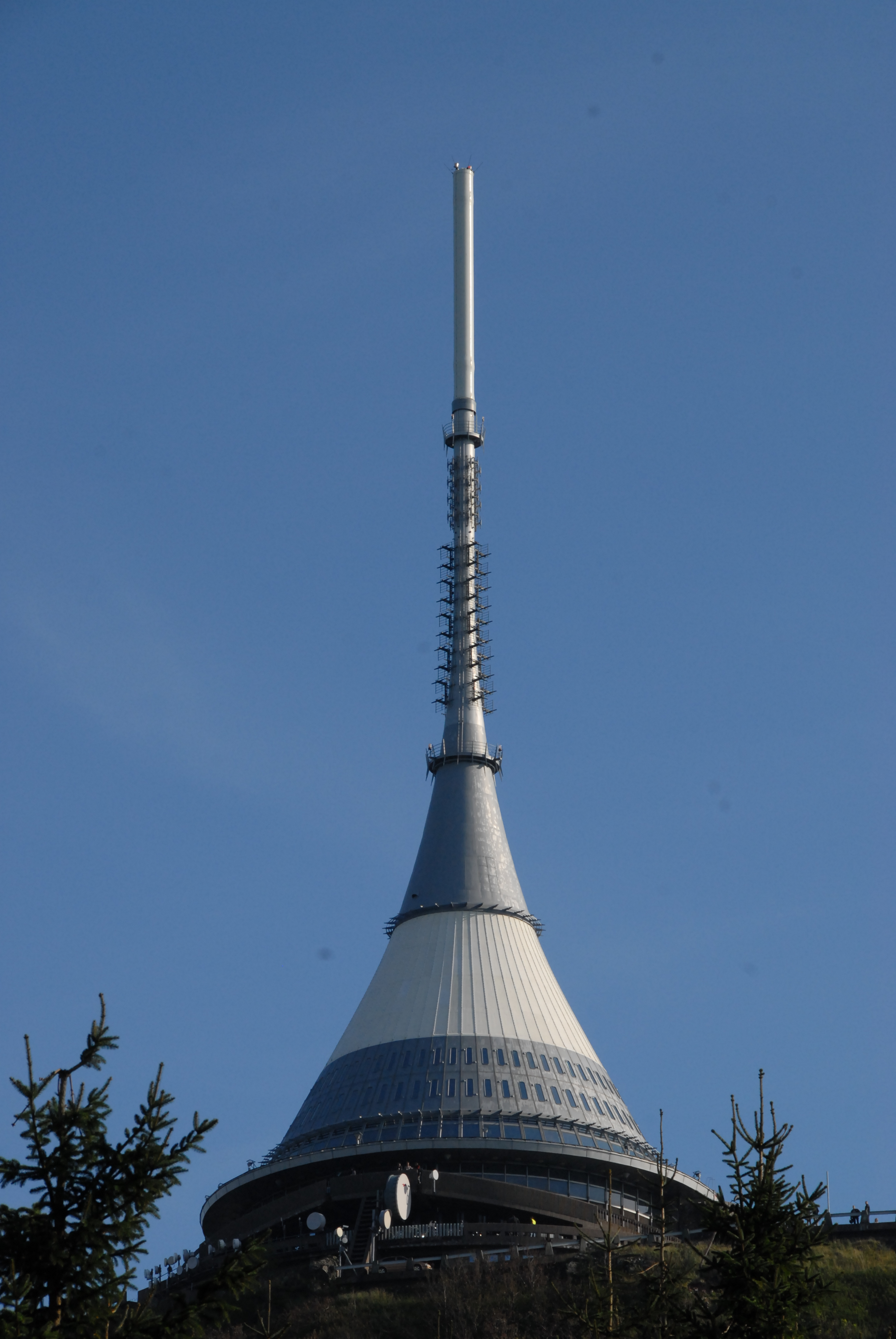 Ještědský vysílač